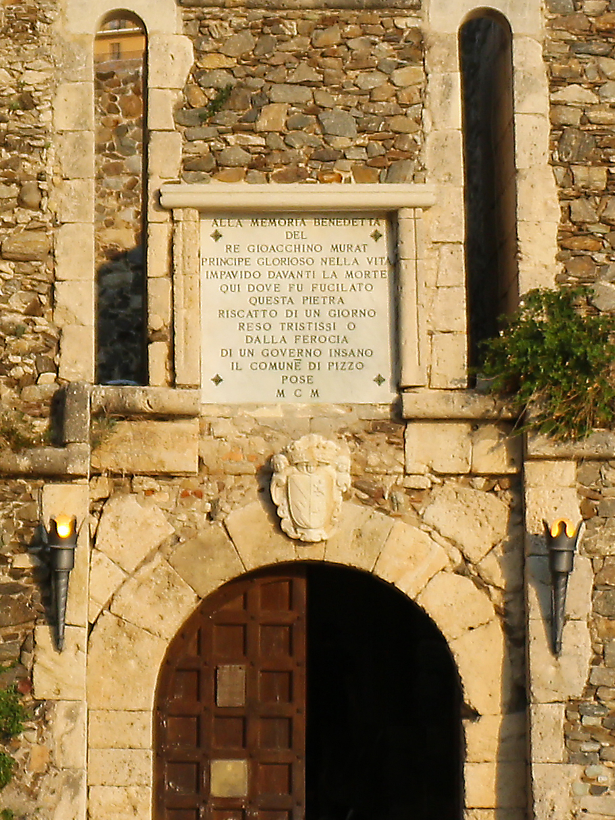 Castello Murat This is a photo of a monument which is part of cultural heritage of Italy.